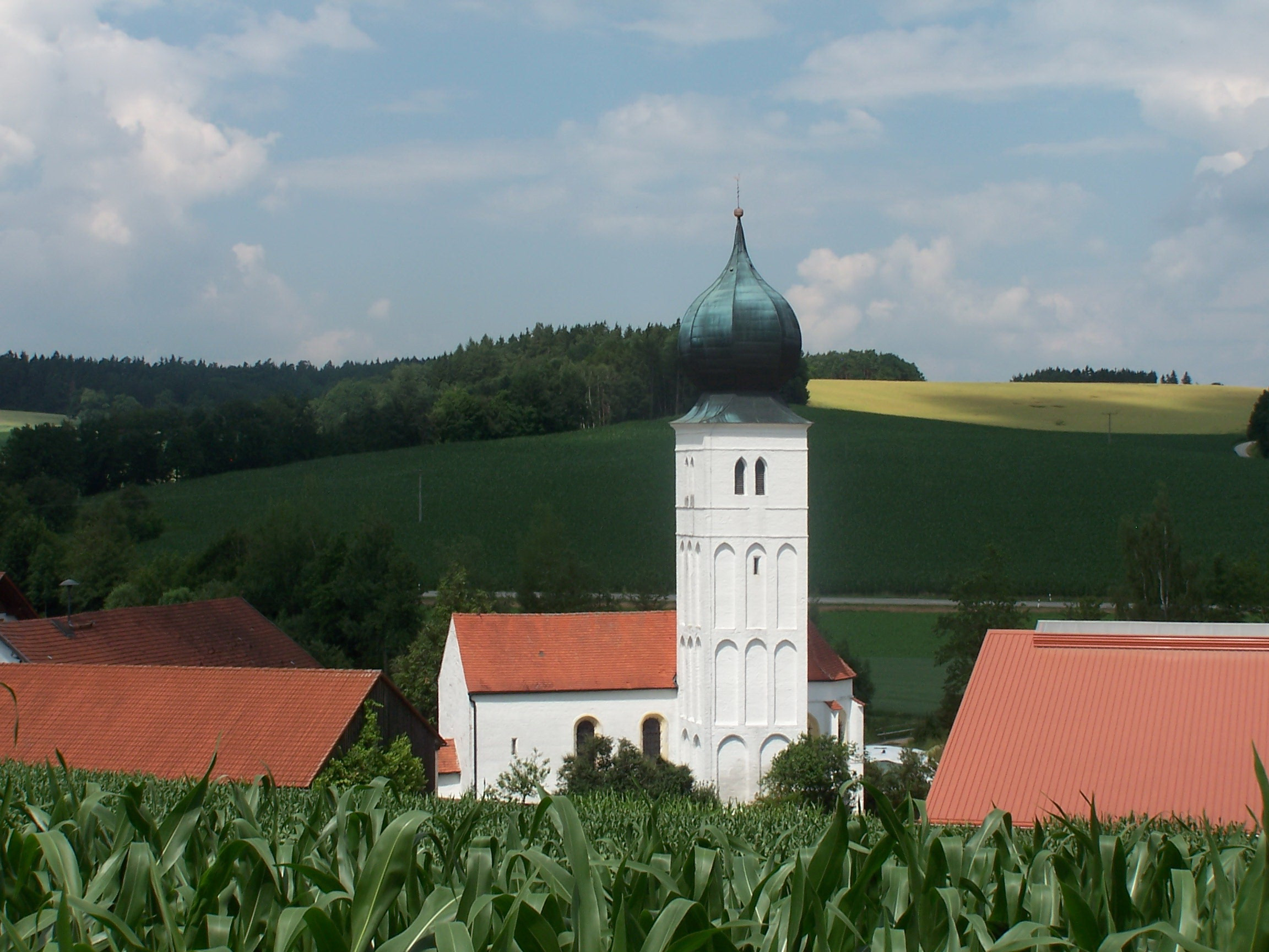 Unterglaim 15. Kirche St. Pankratius um 1494 erbaut, Chor und Turm spätgotisch, Langhaus barock; mit Ausstattung.